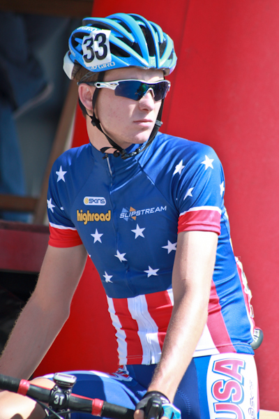 Rob Squire